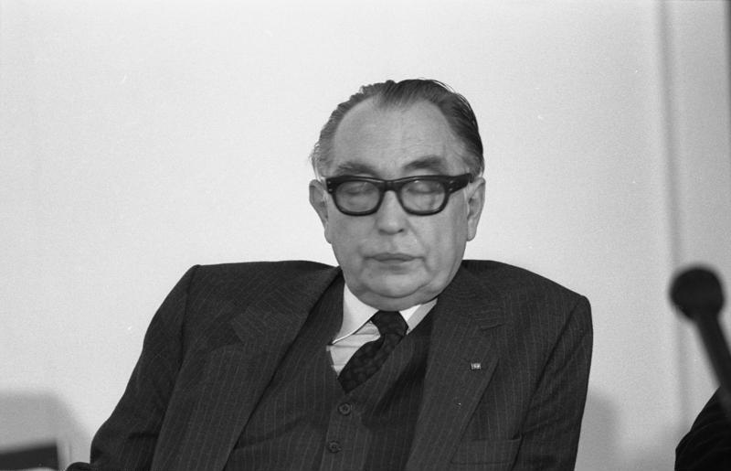 03.02.1983 Friedenskongreß der CDU im Konrad-Adenauer-Haus, Bonn.